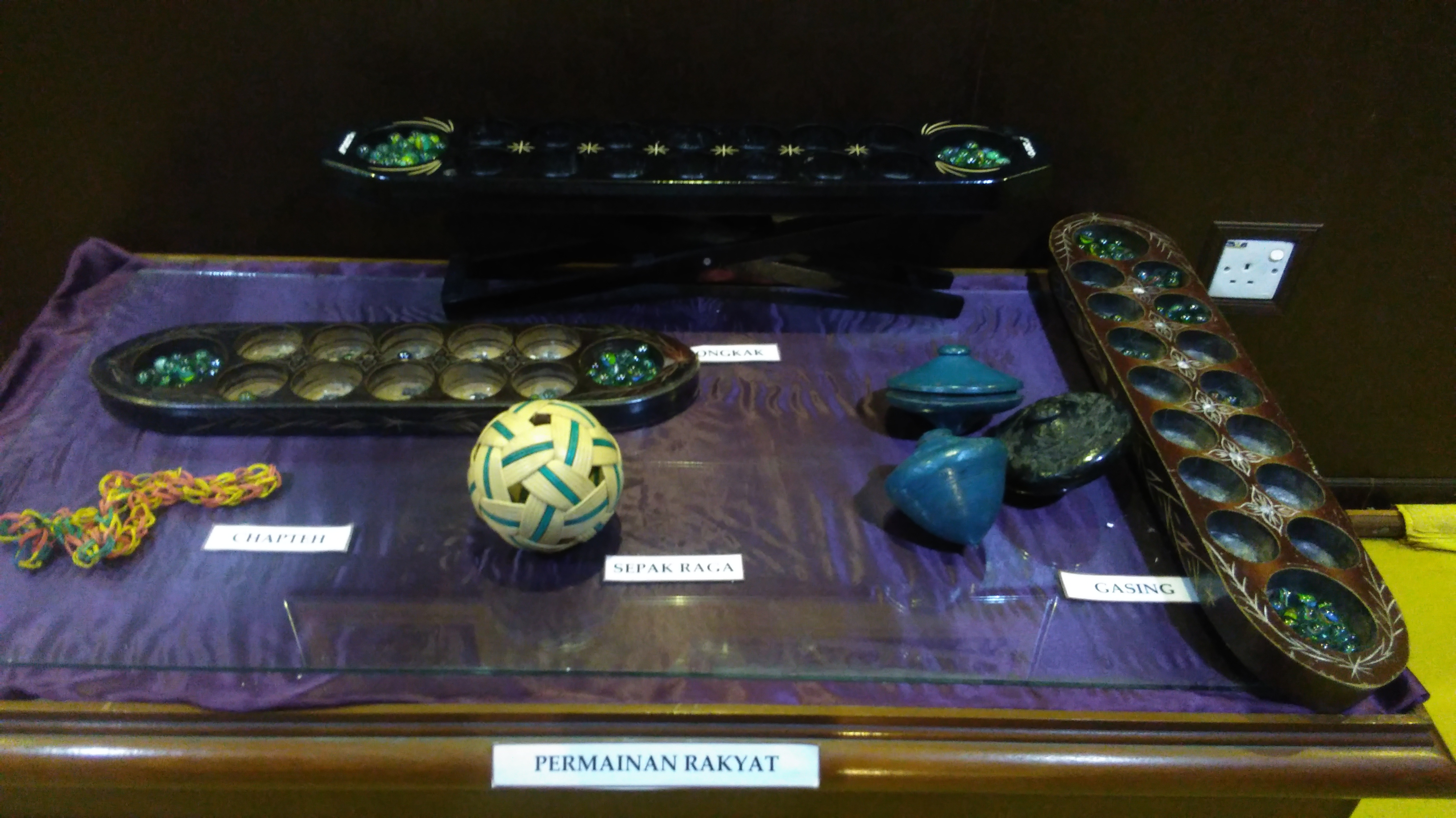 Barang Permainan Rakyat